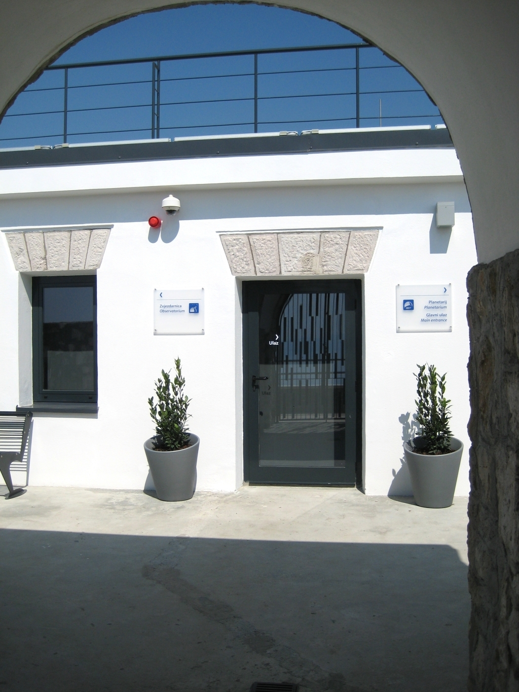 Astronomski centar u Rijeci na brdu Sveti Križ. Dana 18. svibnja 2001. godine članovi Akademskog astronomskog društva Rijeka, astronomi amateri i građani, dobili su Riječku zvjezdarnicu.